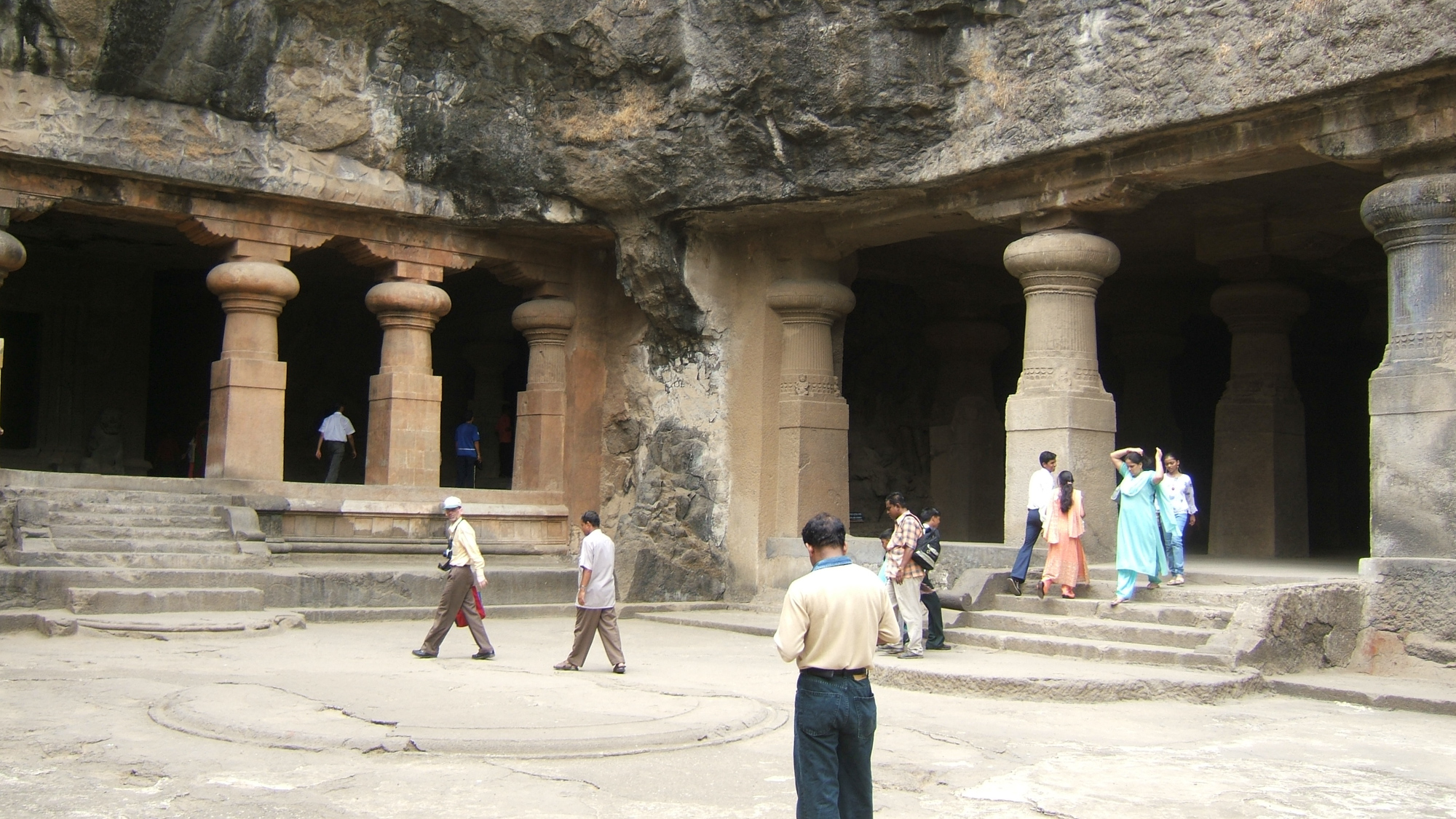 Elephanta Caves, Mumbai